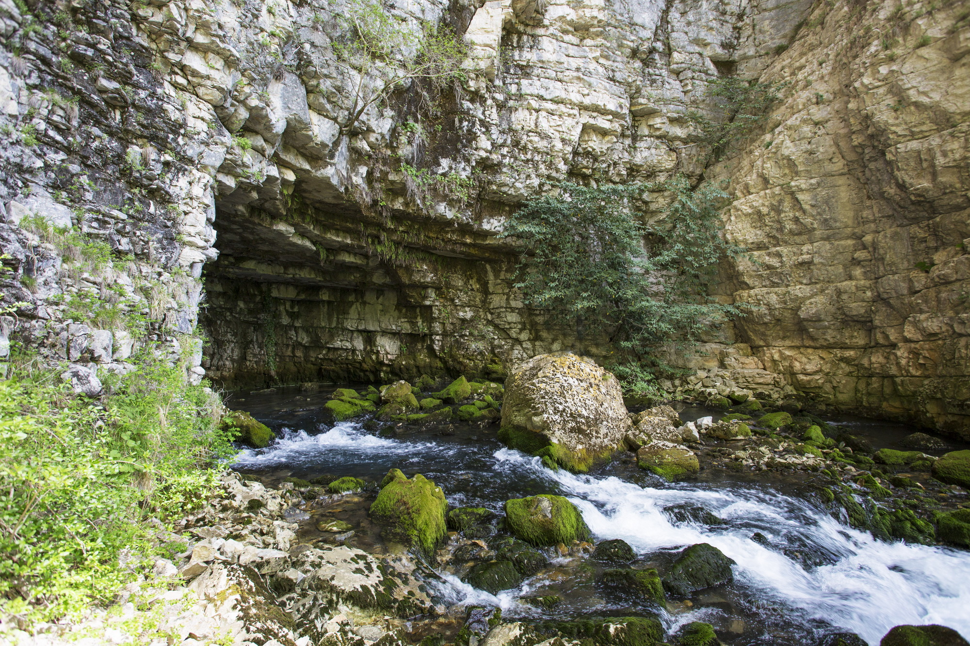 ონიორის ჩანჩქერისა და ტობის პირველი მღვიმის ბუნები ძეგლები ღირშესანიშნაობა: ბუნების ძეგლების კომპლექსი წარმოადგენს ტობა პირველის მღვიმისა და მისგან გადმომავალი ონიორეს ჩანჩქერის ერთობლიობას, რომელიც იშვიათ და ულამაზეს სანახაობას ქმნის. მღვიმე გამომუშავებულია ზედაცარცულ შრეებრივ კირქვებში. შესასველეი (12X5 მ) ქარაფის გასწვრივ იხსნება. შესასვლელიდან 70 მეტრში 21 მ სიმაღლის მიწისქვეშა ჩანჩქერია, სადაც ჭერის სიმაღლე 30 მეტრზე მეტია. ცალკეულ ადგილას გვირაბის სიგანე 12-15 მ აღწევს. მღვიმიდან გამომავალი მიწიქვეშა მდინარე 15 მეტრში, 67 მ სიმაღლის ონიორეს ჩანჩქერს წარმოქნის. მდებარეობა: მარტვილის მუნიციპალიტეტი, სოფ. მეორე ბალდის ჩრდილო-აღმოსავლეთით, მდ. აბაშის მარჯვენა შენაკადის ტობას ხეობა, 680 მეტრი ზღვის დონიდან. კოორდინატები: N42 28.643 E42 27.520